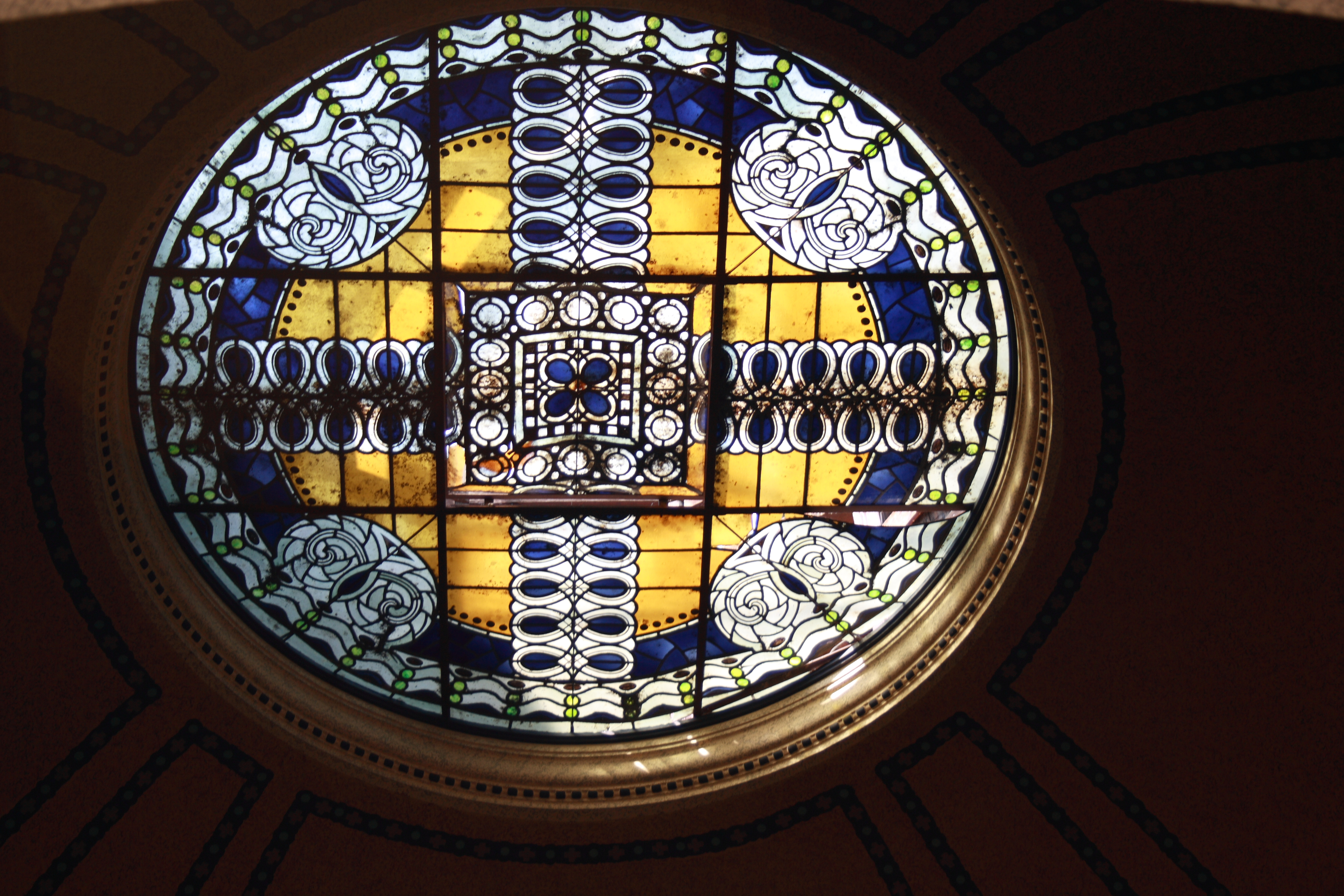 Mausoleum der Familie Mertes in Bad Breisig, Koblenzer Straße, auf dem ehemaligen Friedhof